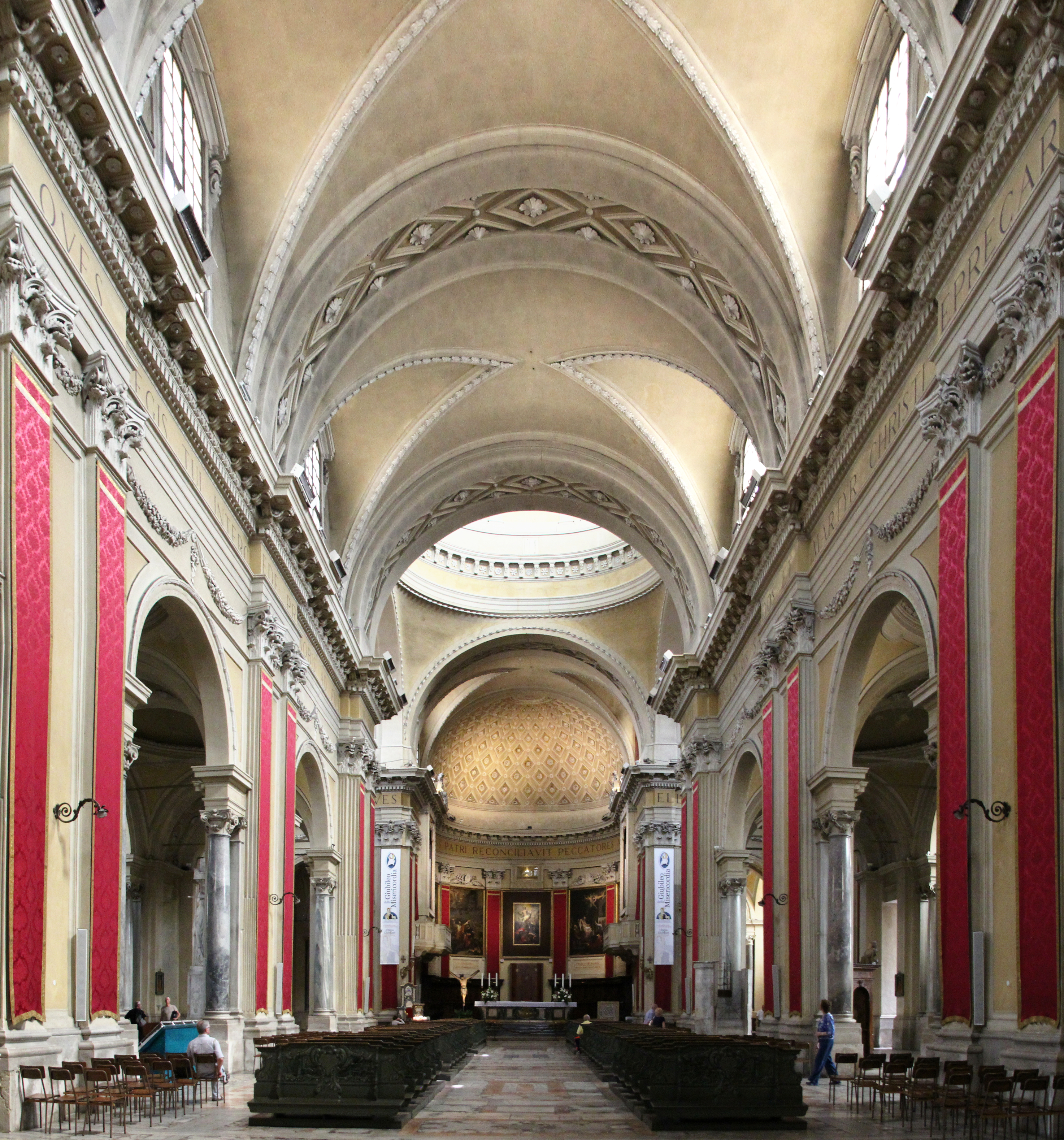 L'interno